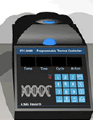 Imagen de un termociclador